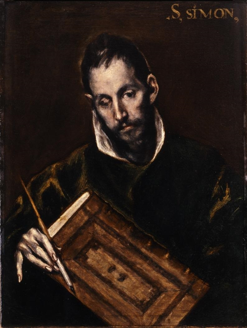 La obra representa a San Lucas Evangelista, y aunque la inscripción colocada en la parte superior del lienzo afirma erróneamente que se trata del apóstol San Simón, la mayoría de los autores coinciden en la actualidad en que indidablemente el representado es San Lucas.